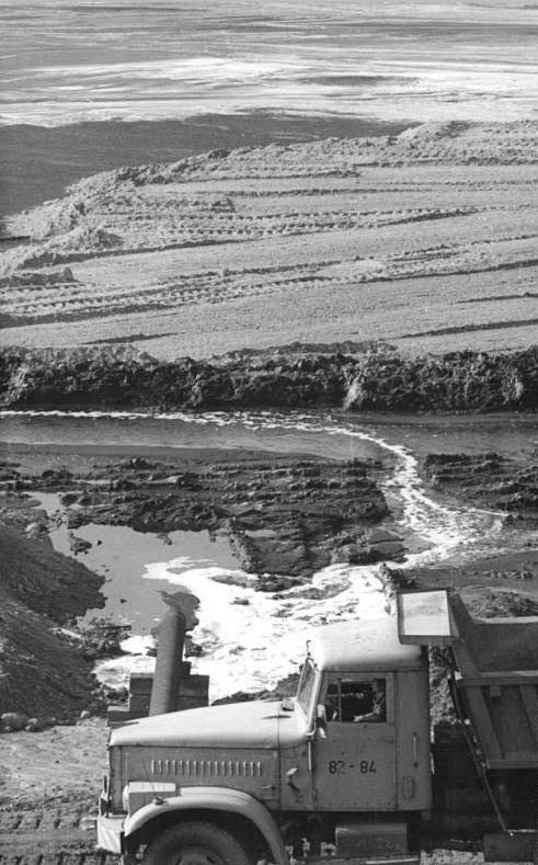 Culmitzsch, Halde der Wismut, Uranerzaufbereitung ADN-Jan-Peter Kasper 25.10.90 Thüringen: Voller Betrieb herrscht noch auf der industriellen Absetzanlage der Wismut in Culmitzsch: Hier werden Rückstände aus der Uran-Erzaufbereitung endgelagert.